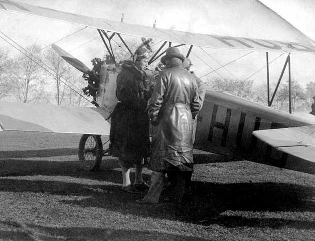 Odescalchi Miklós herceg és repülőgépe